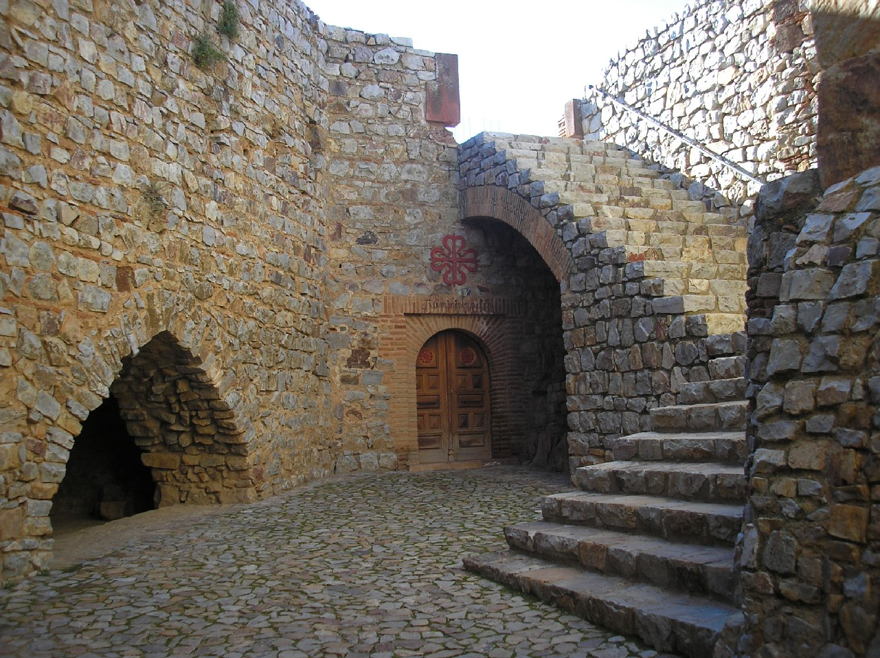 Calatrava Castle